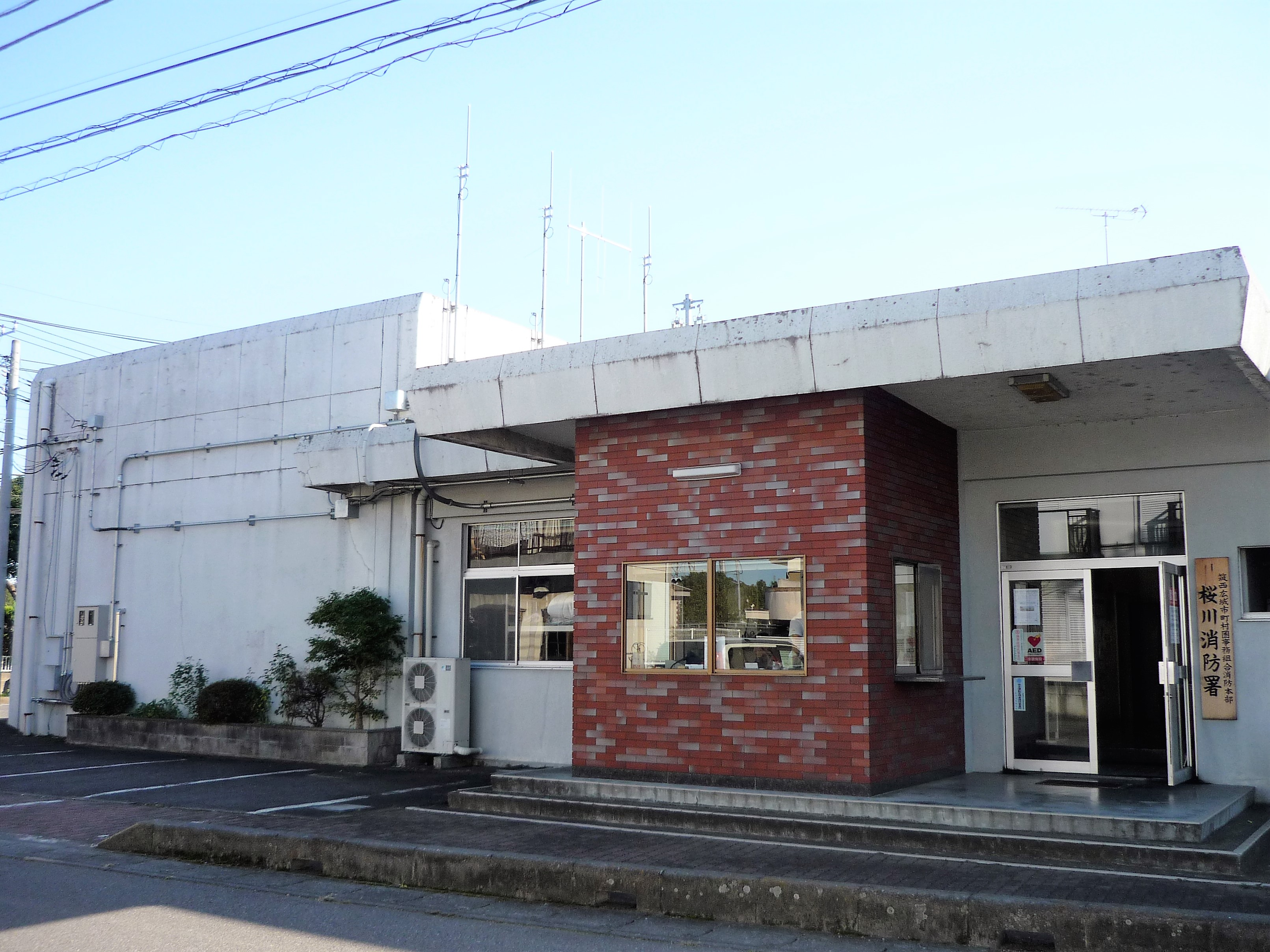 筑西広域市町村圏事務組合消防本部 桜川消防署 Panasonic Lumix DMC-FS3